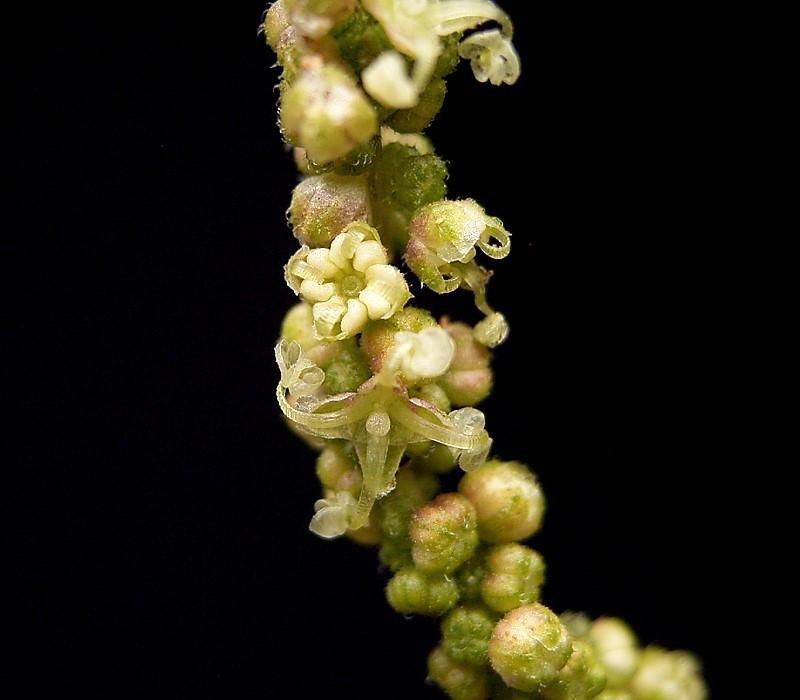 Urtica dioica